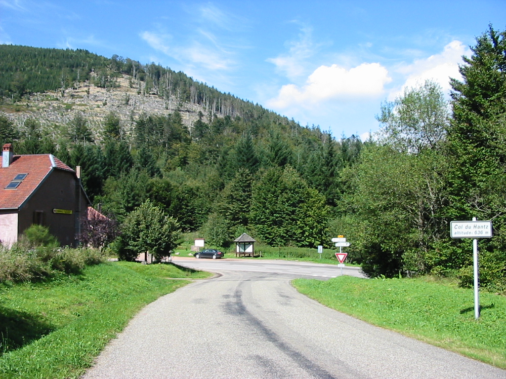 Col du Hantz, entres les vallées du Rabodeau et de la Bruche.